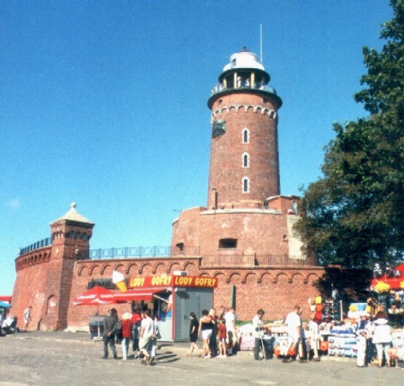 Leuchtturm im Hafen von Kołobrzeg (Kolberg) / Lighthouse in the Harbour of Kołobrzeg